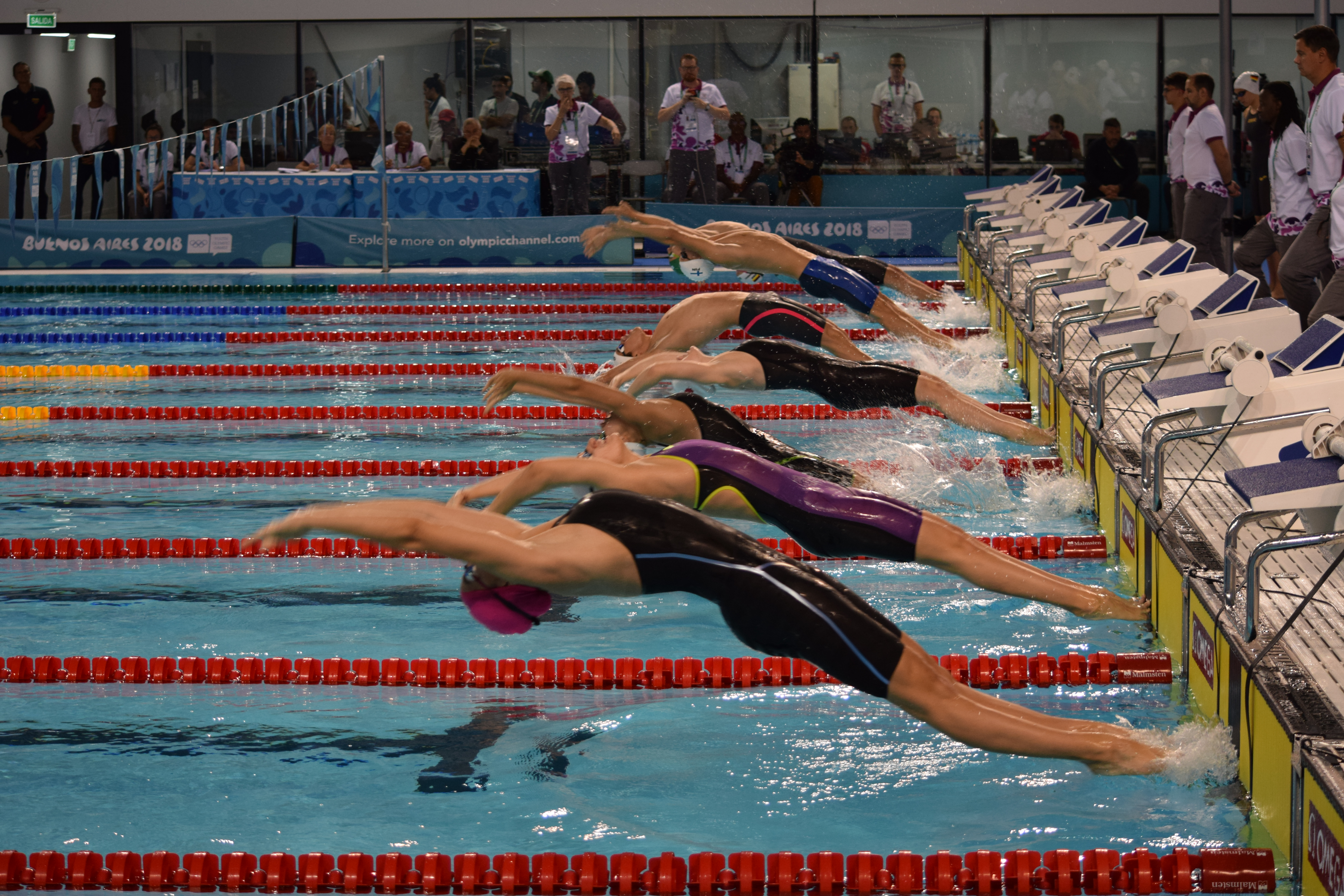 Natación durante los Juegos Olímpicos de la Juventud 2018 en Buenos Aires. Tarde del 10 de octubre. Andrei MINAKOV, Jakub KRASKA y Robin HANSON.